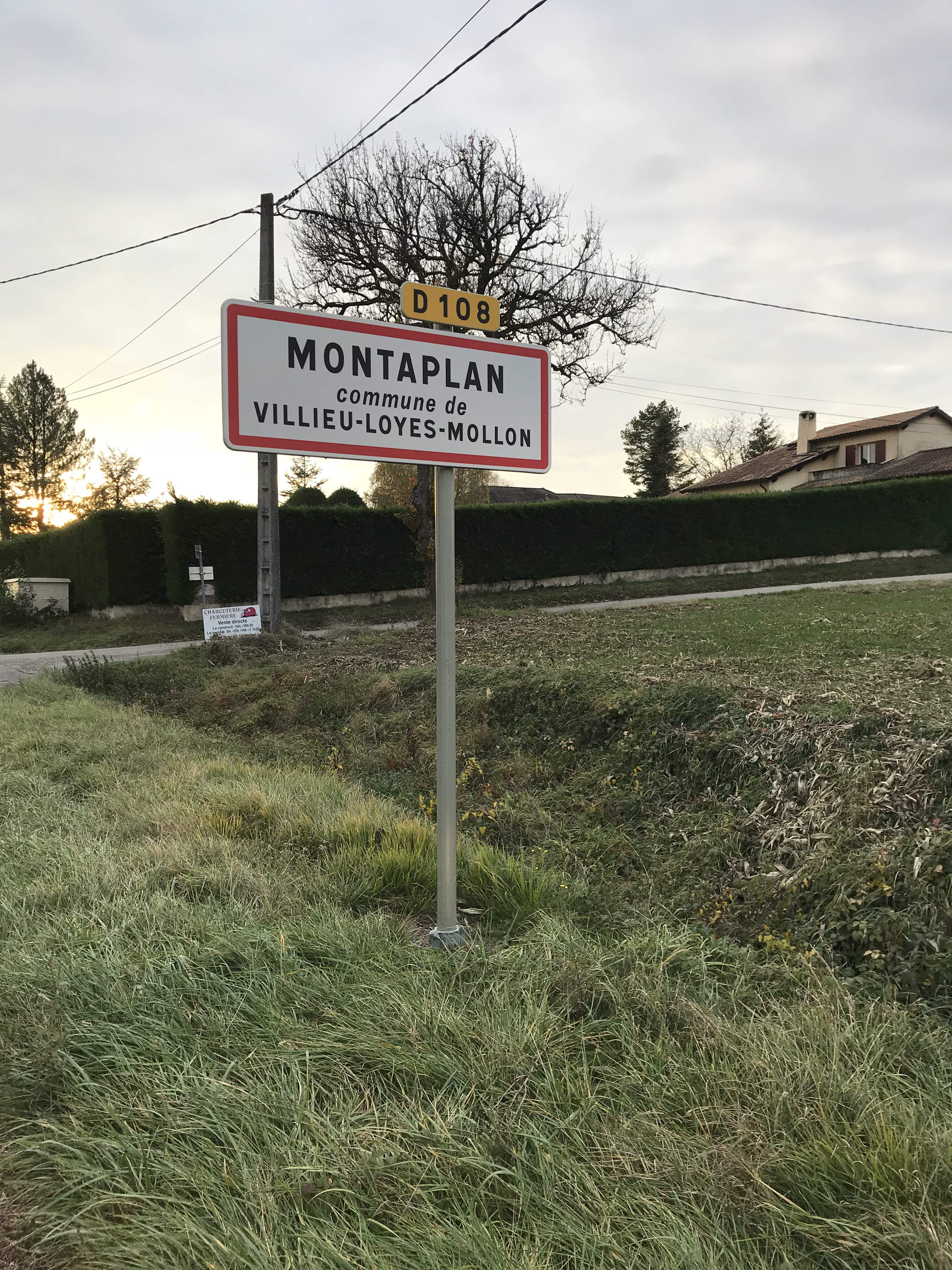 Panneau du hameau de Montaplan près de Loyes (Villieu-Loyes-Mollon, Ain, France).